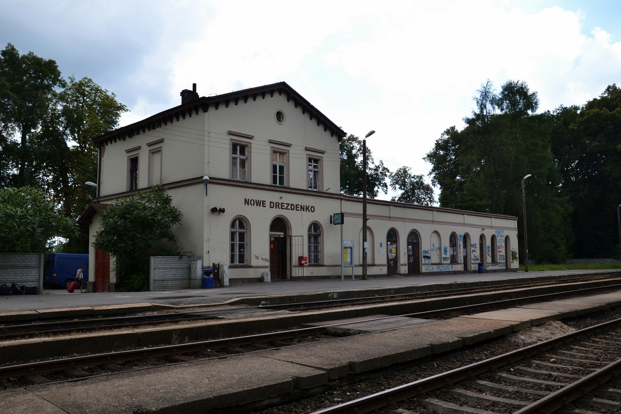 Dworzec kolejowy w Nowym Drezdenku